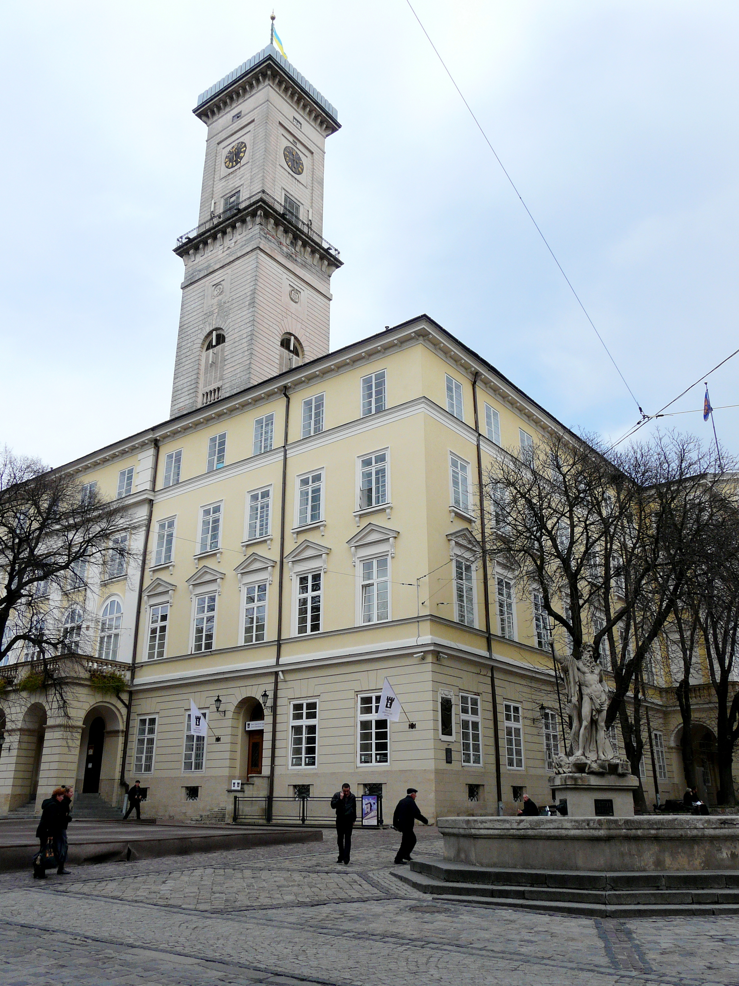 ратуша, Львів, Ринок пл., 1